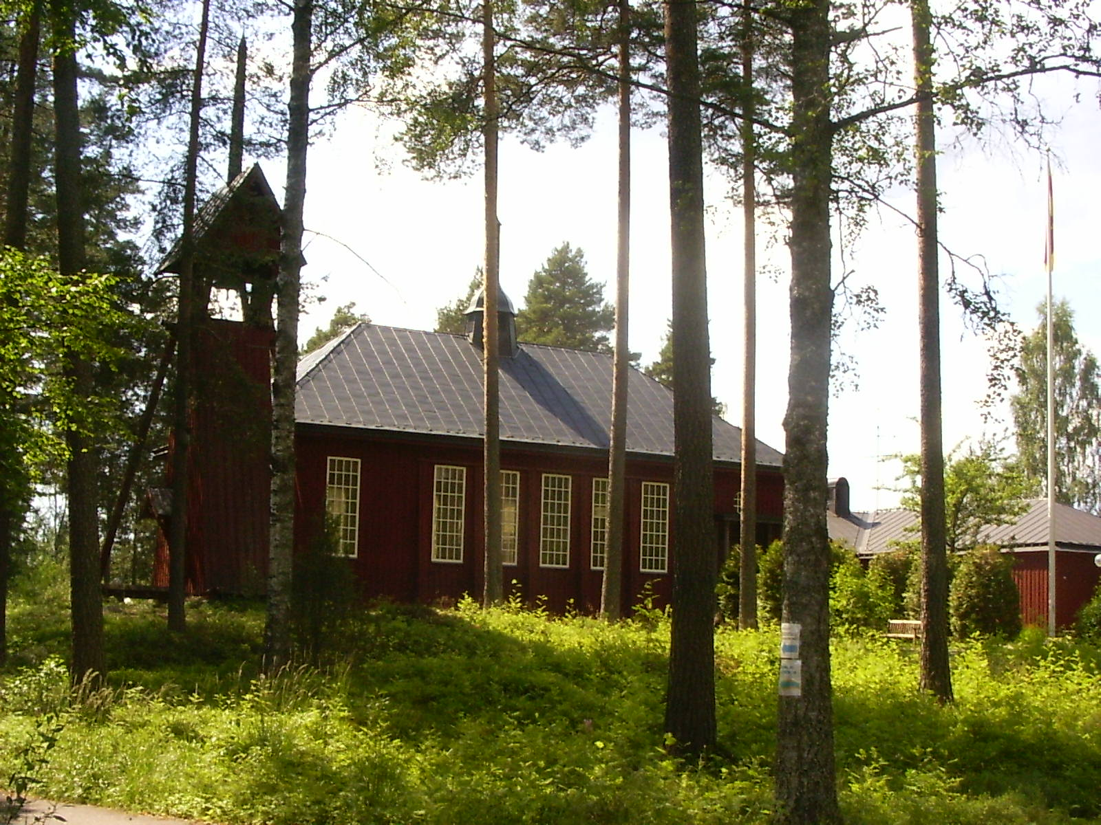 Vansbro, kerk